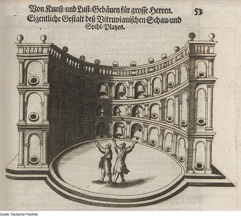 Original image description from the Deutsche Fotothek Akustik & Schall & Schallgefäß & Theater & Ordensliteratur